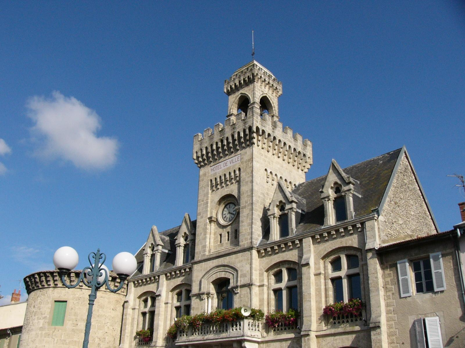 Façade de l'hôtel de ville de Chabeuil (Drôme) (France)